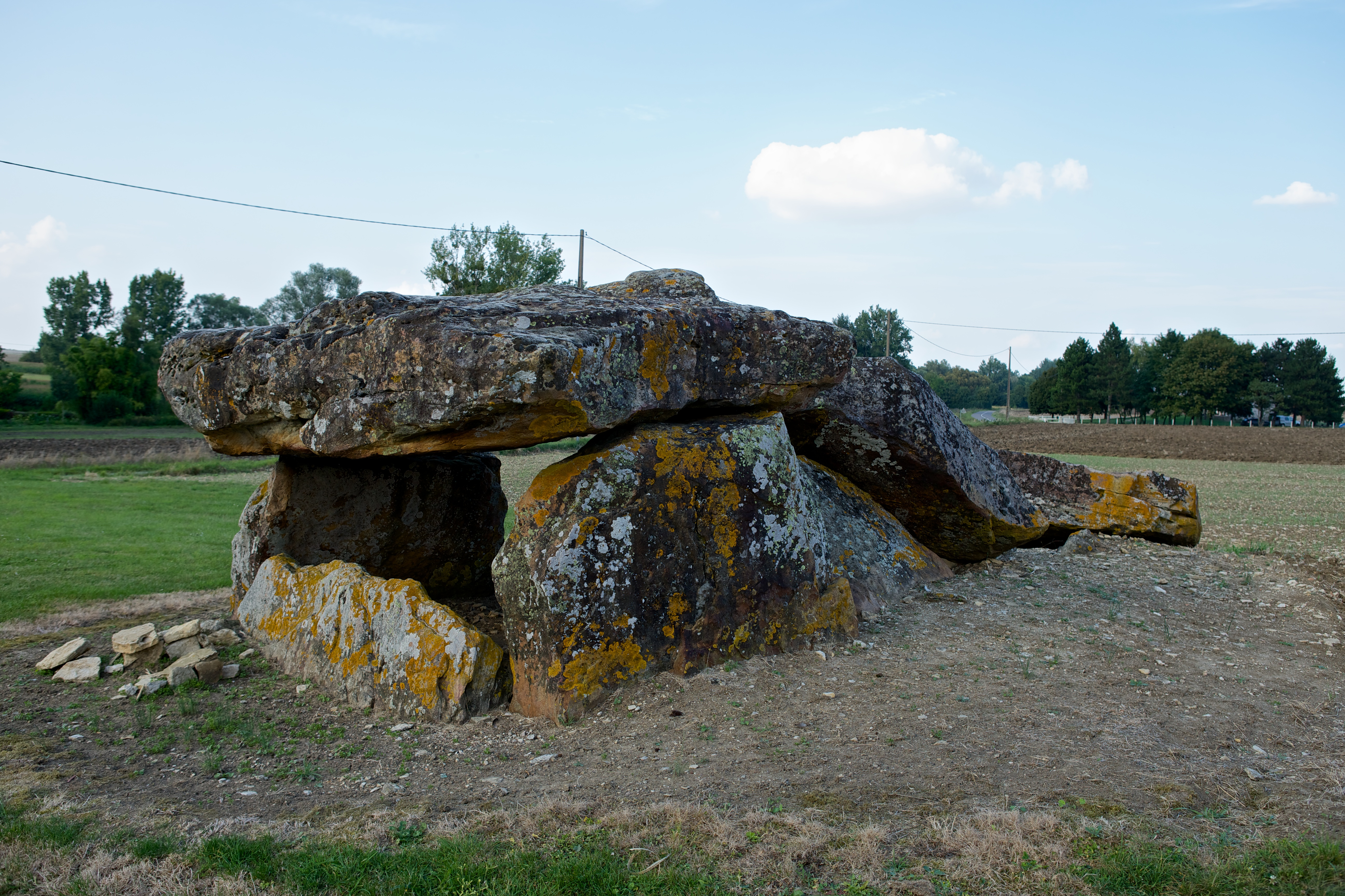 Vue Nord-Ouest